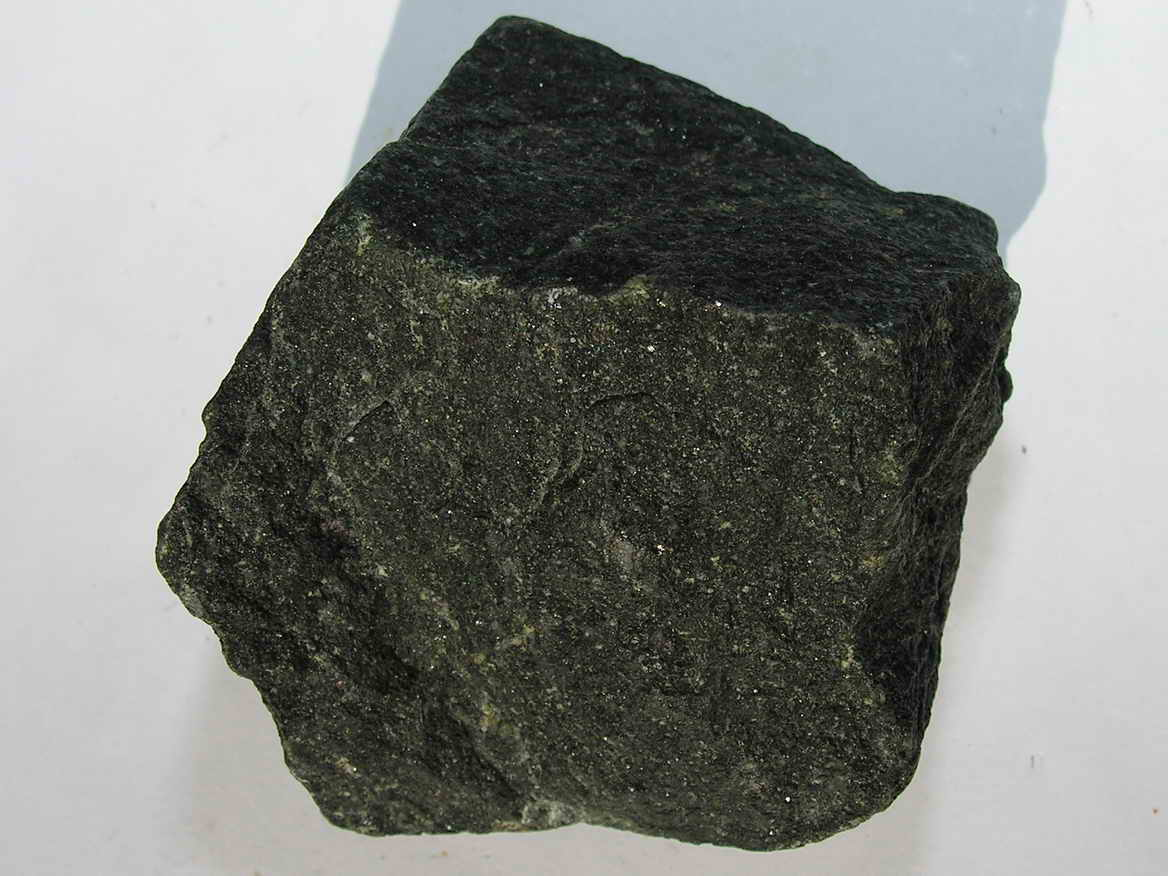 Wolframio